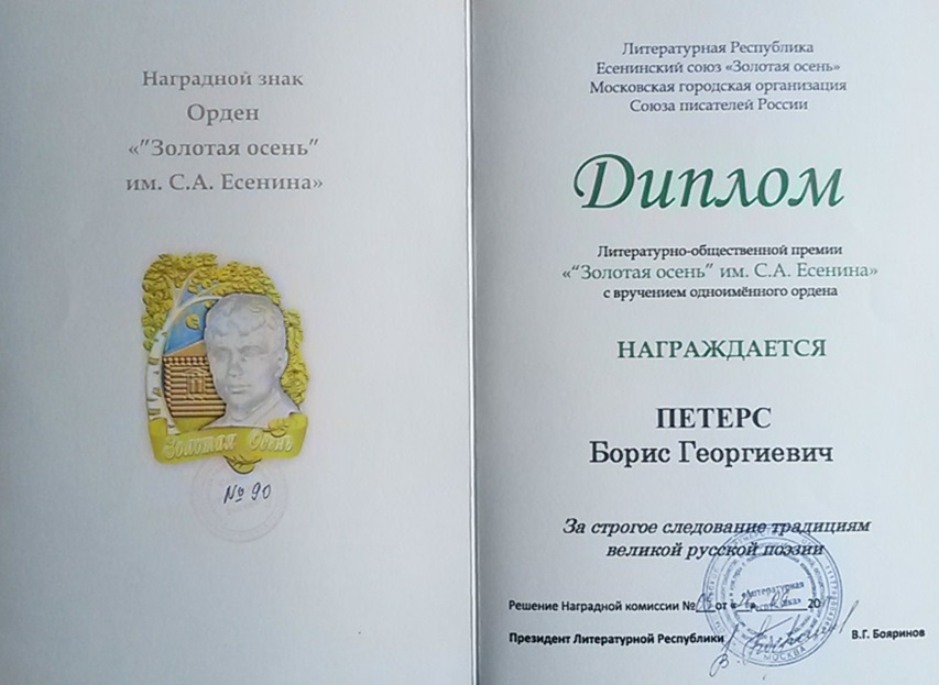 Петерс Б.Г. Орден Есенина 260911